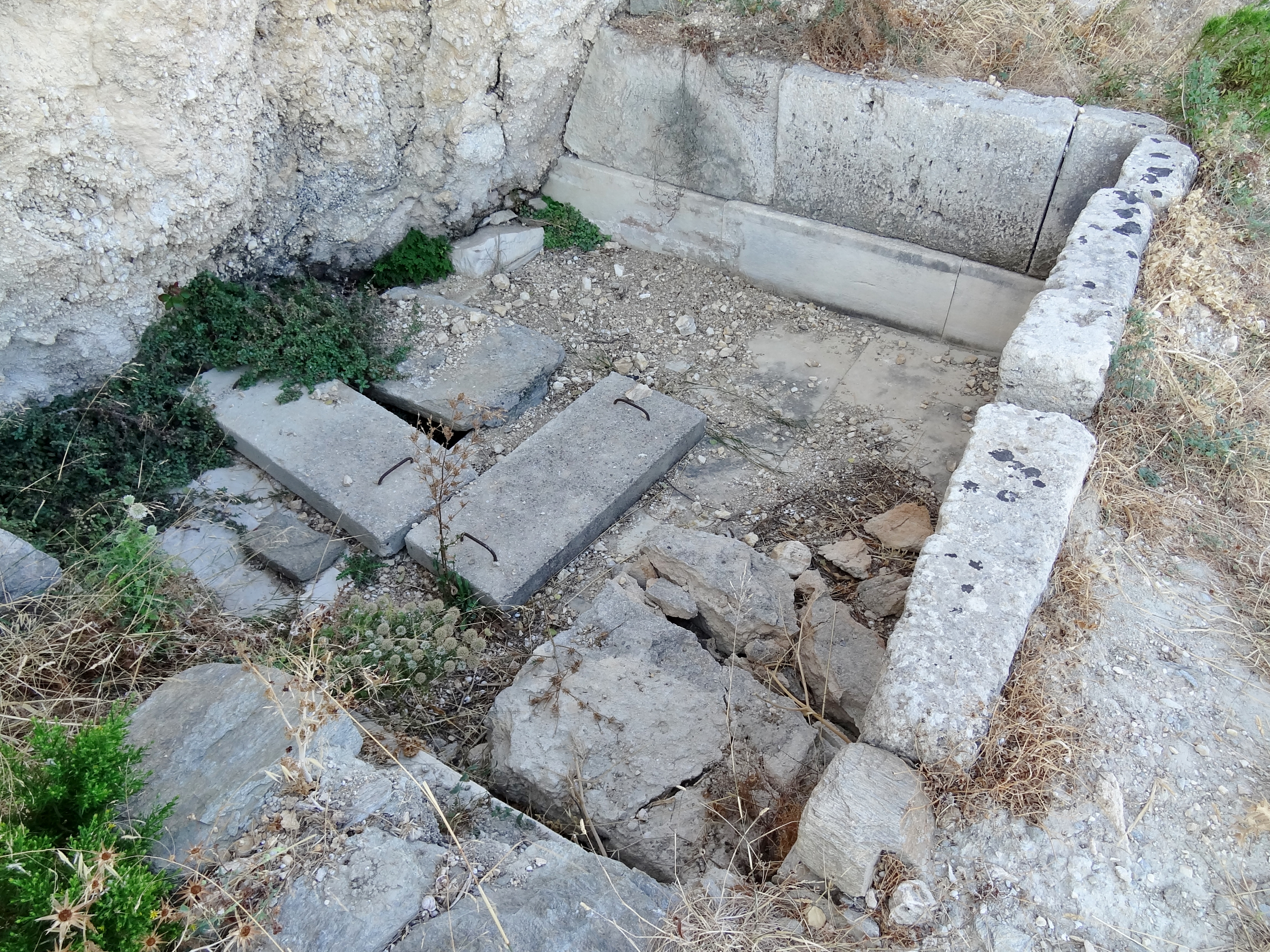 Asklepieion in Parikia auf Paros, Kykladen, Griechenland